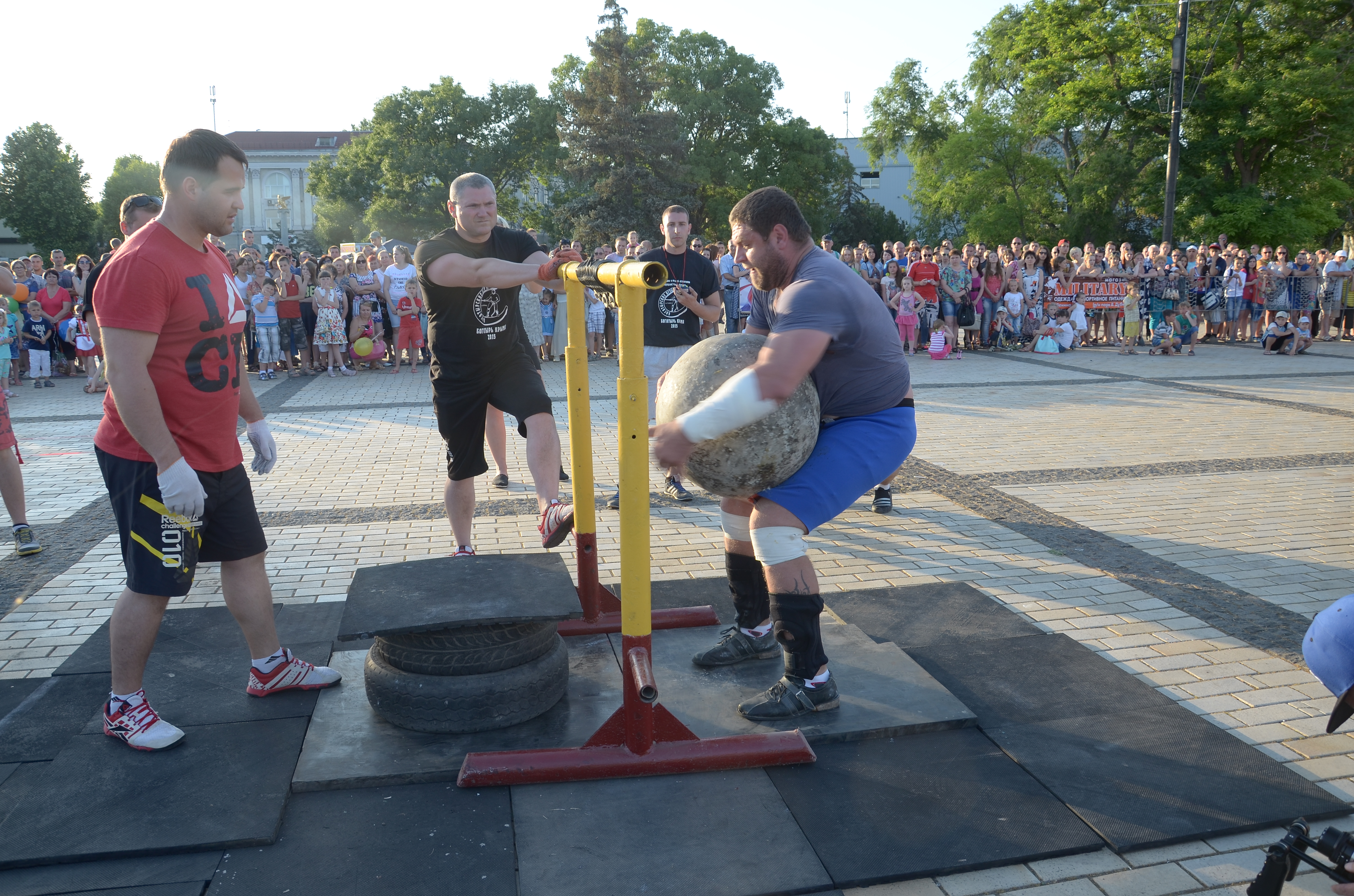 Богатырские игры в Керчи